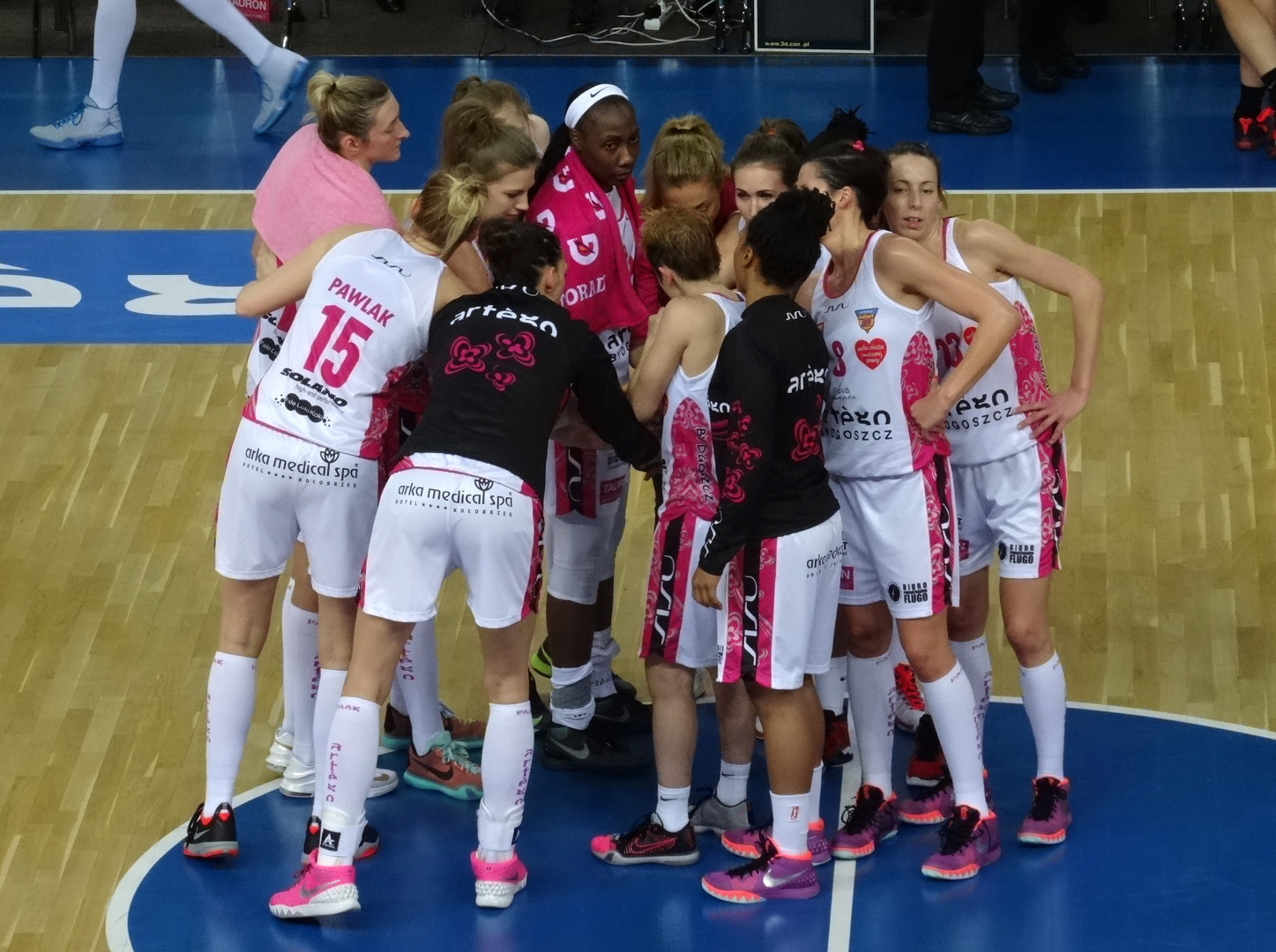 Mecz Polskiej Ligi Koszykówki Kobiet (Basket Ligi Kobiet) Artego Bydgoszcz - Energa Toruń, 7 listopada 2015 roku w Artego-Arenie w Bydgoszczy